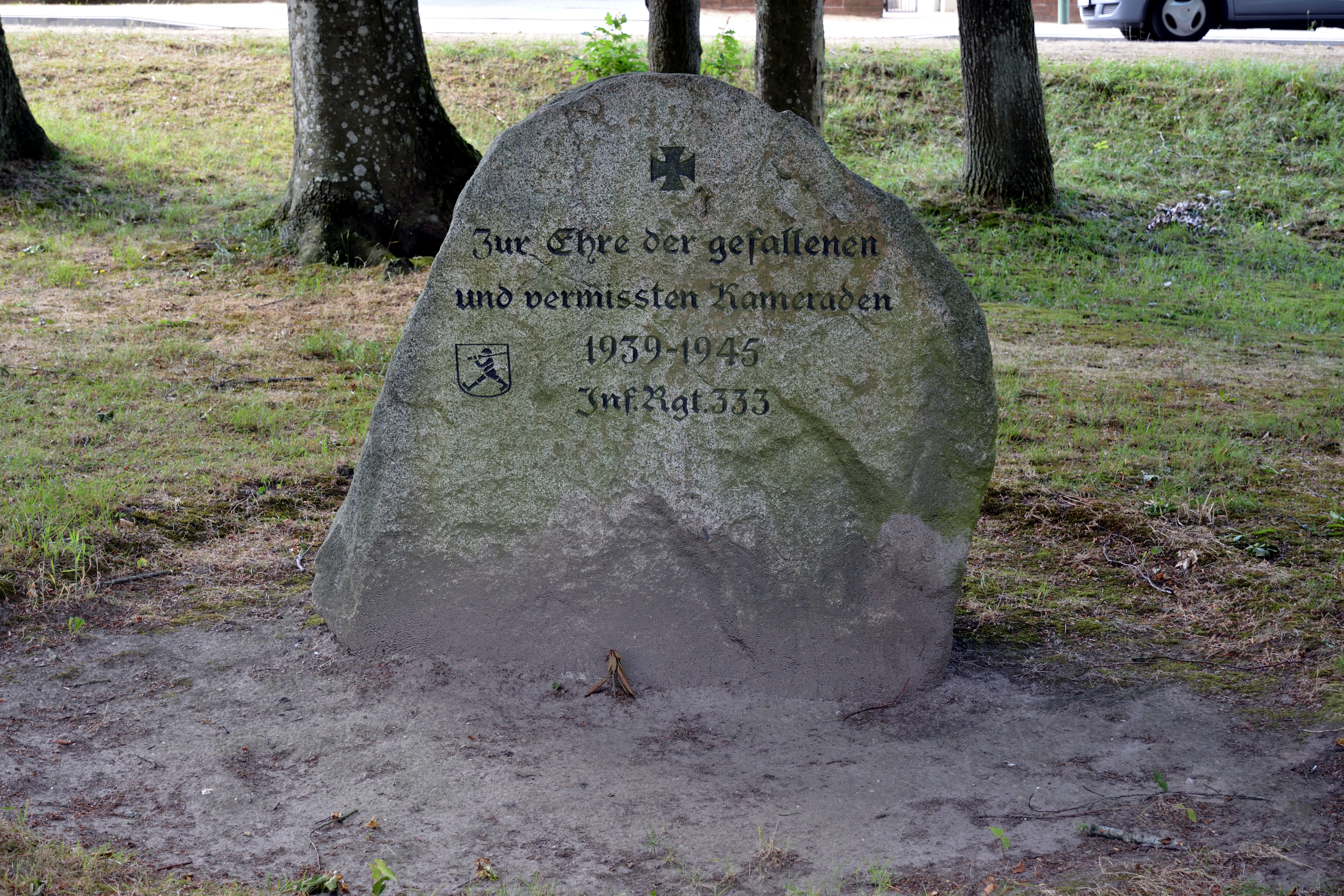 Der Ehrenhain in Albersdorf mit Gedenksteinen für gefallene Soldaten.Gedenkstein für das Infanterie-Regiment 333.